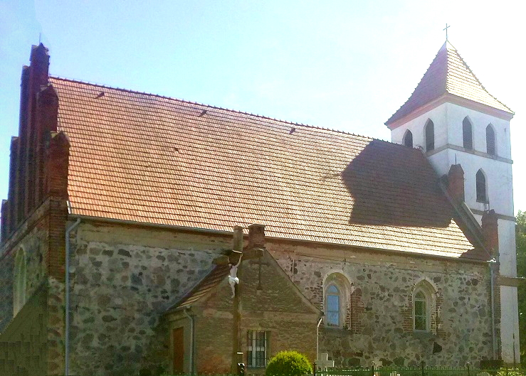 Nowy Targ - rzymskokatolicki kościół filialny pw. św. Rocha, 1340, XIX